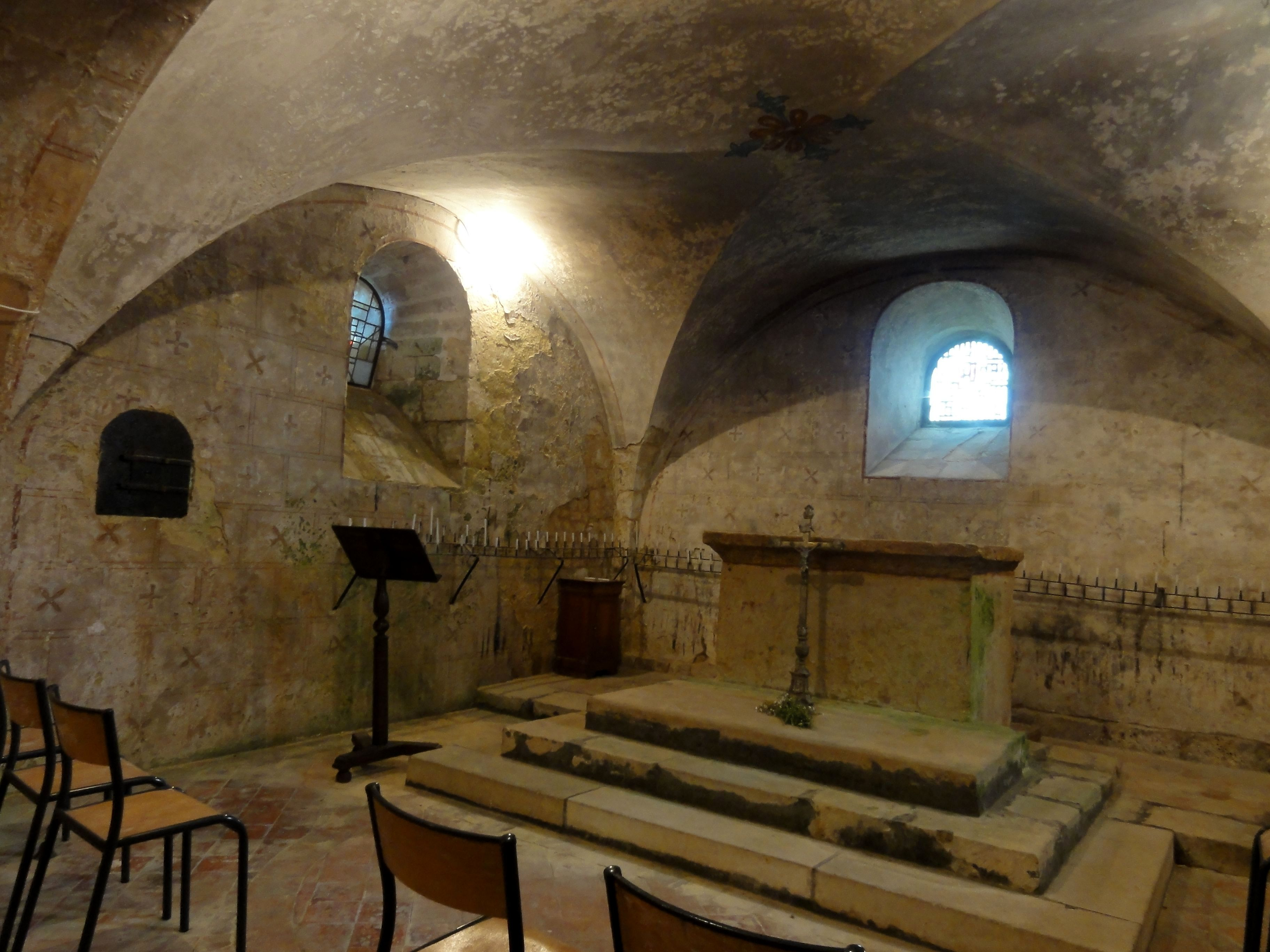 Voir titre du fichier.